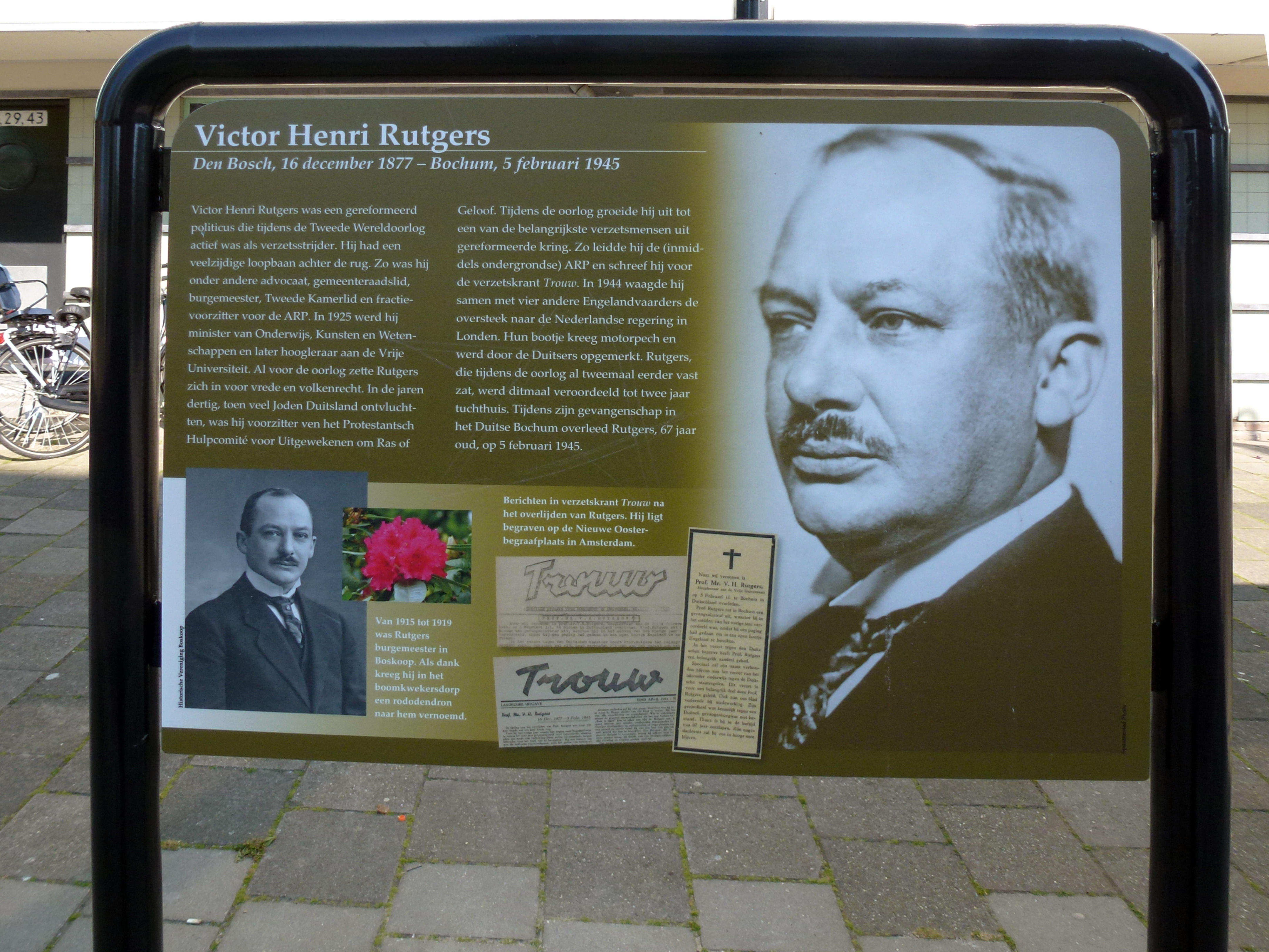 Verzetsheld Victor Henri Rutgers. Op 10 april 2014 zijn in Oosterwei 10 van in totaal 16 borden met informatie over verzetsstrijders onthuld. In Oosterwei, een wijk in Gouda, zijn na de 2e wereldoorlog, de wederopbouw, 16 straten vernoemd naar verzetsstrijders. Veel bewoners van deze straten wisten maar weinig over de verzetshelden waarnaar de straten vernoemd zijn. Zij en anderen hebben er voor gezorgd dat nu in iedere straat een informatiebord staat, zodat de gedachtenis aan deze strijders levend blijft. (De overige 6 borden zijn in april 2018 geplaatst)